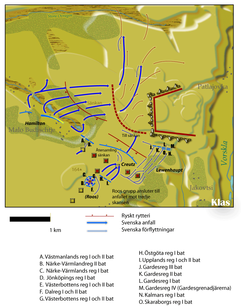 Illustration: Klas Sandberg. Källa: Karl XII på slagfältet